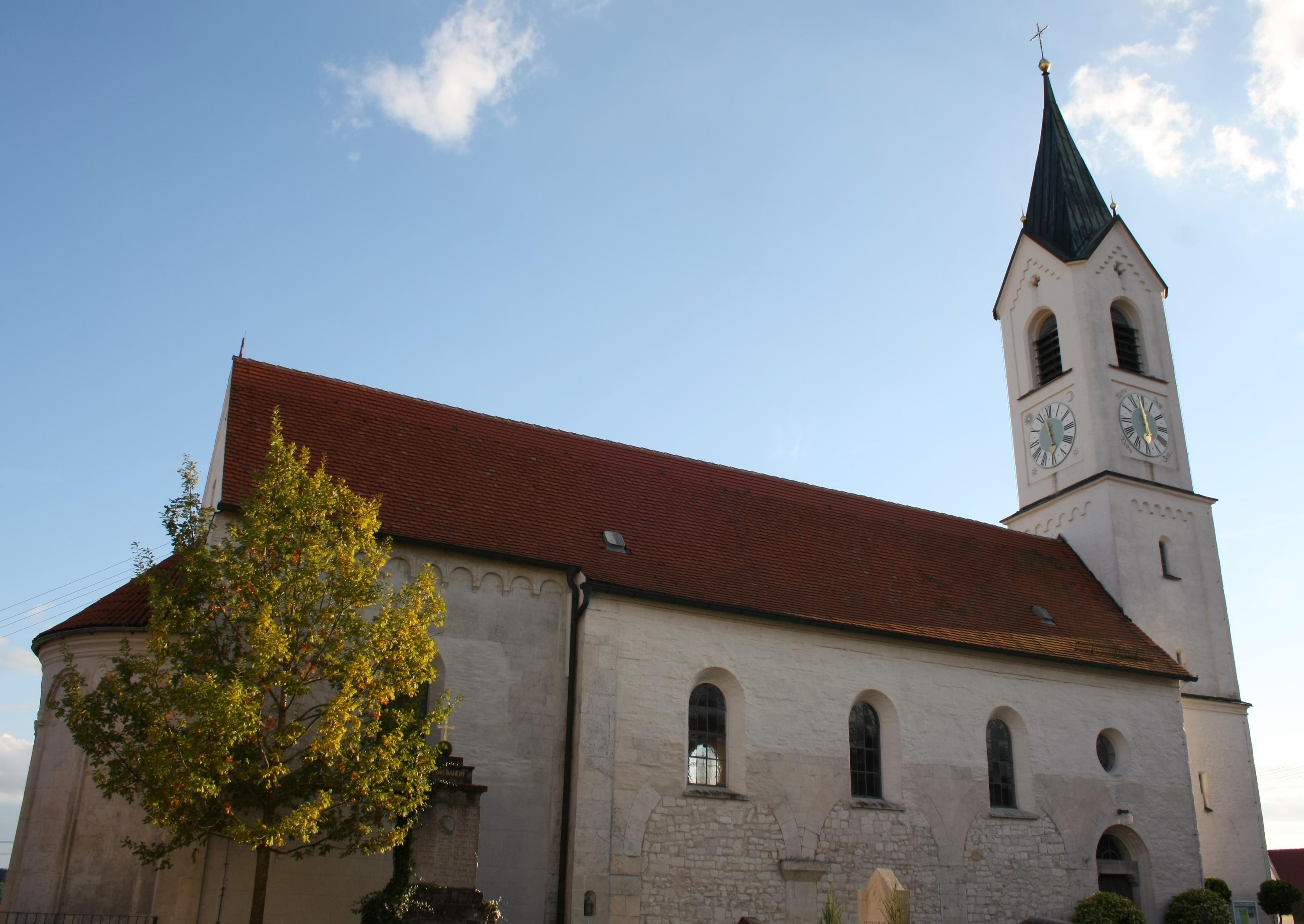 Katholische Pfarrkirche St. Vitus in Reistingen (Gemeinde Ziertheim), Ansicht von Norden. Die zugemauerten Rundbogenarkaden gehen auf das romanische, ehemals dreischiffige Langhaus zurück.